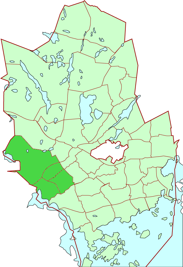 Suur-Kauklahti/Stor-Köklax district in Espoo city, Finland